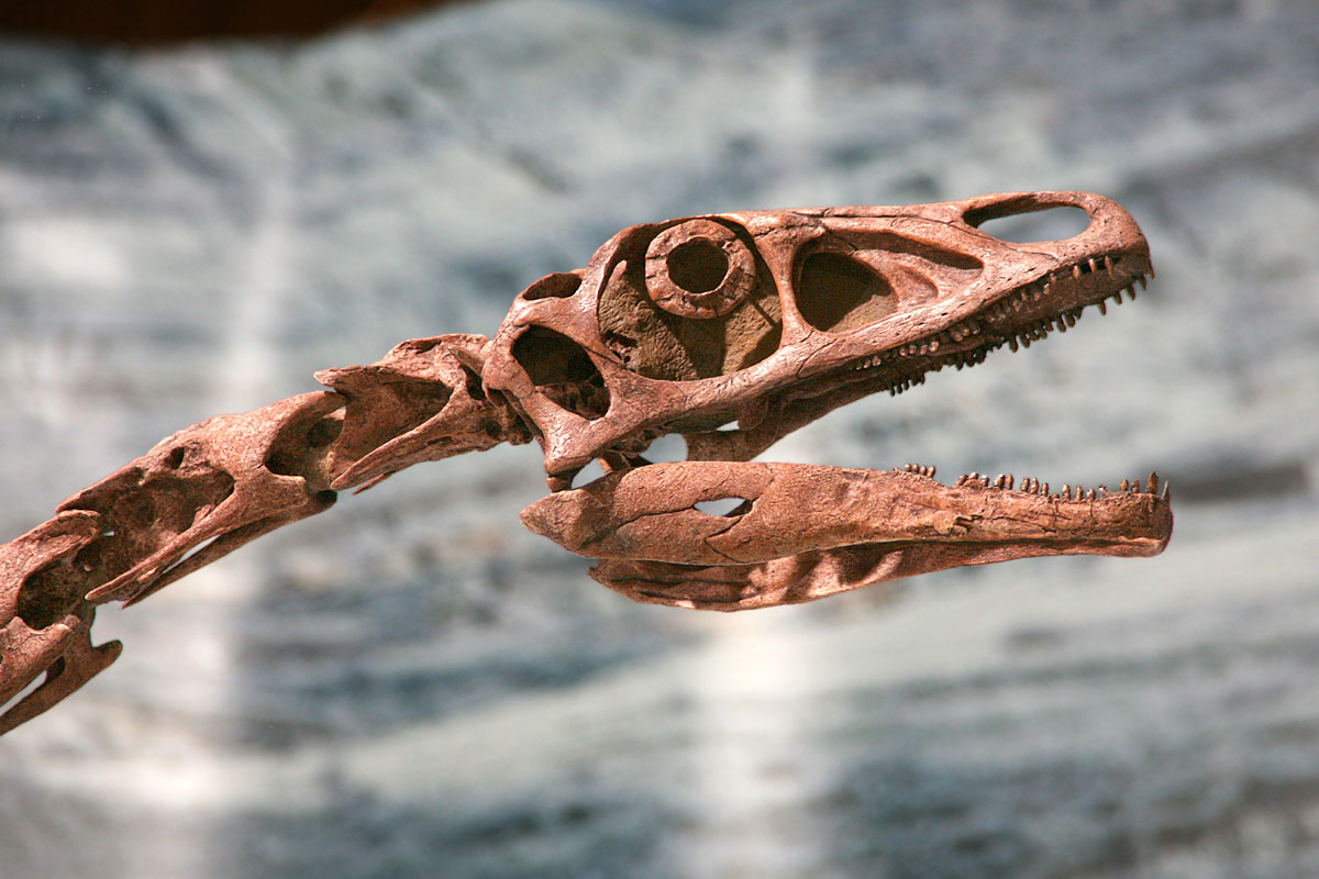 Falcarius - 03